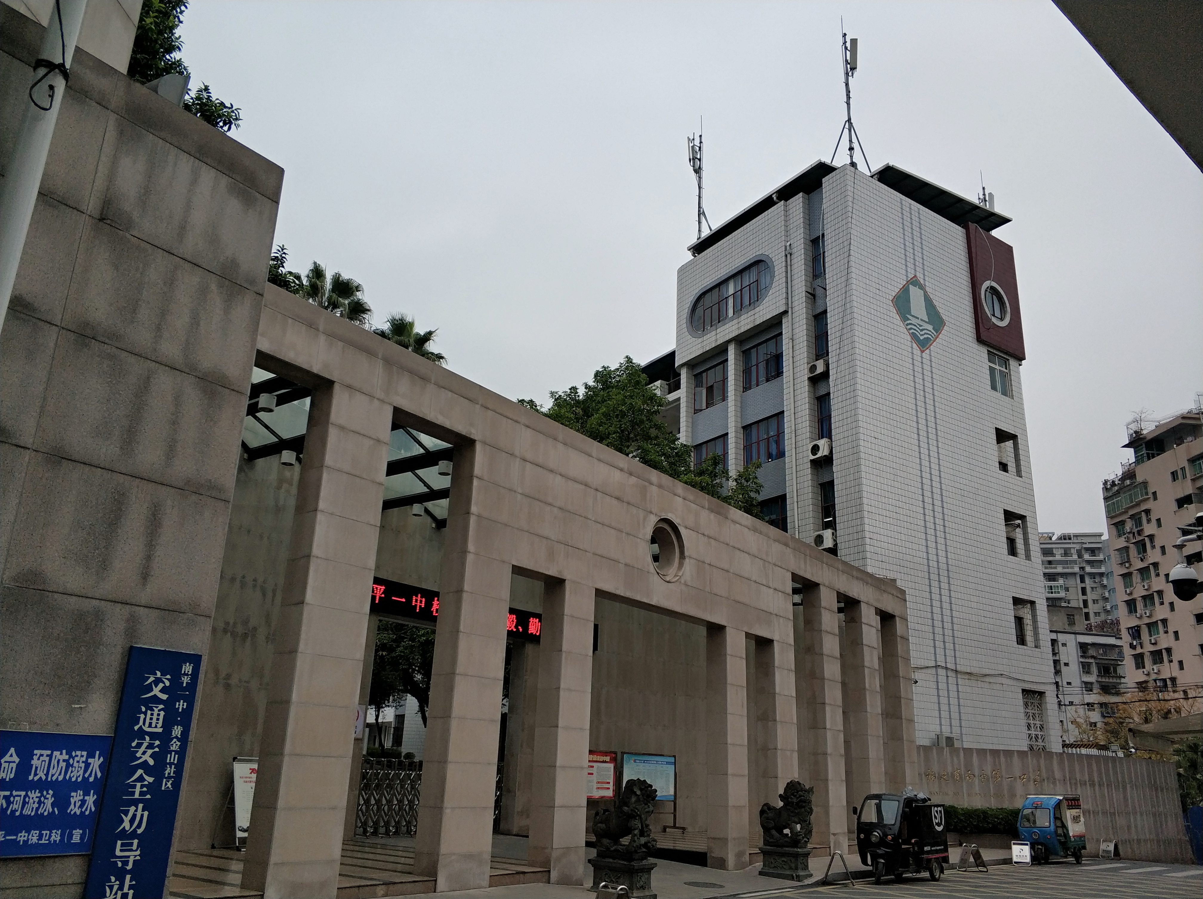 中文（中国大陆）: 南平市延平区